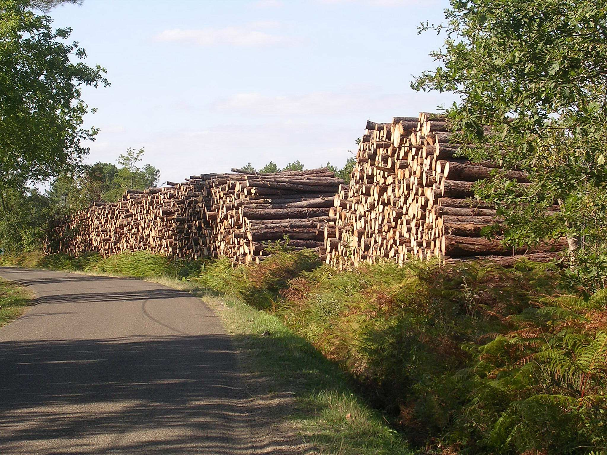 Bois stocké à Saint-Perdon (Landes, France) après le passage de la tempête Klaus du 24 janvier 2009